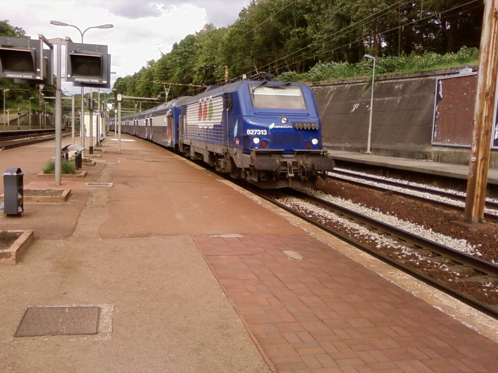 Gare de Chaville-Rive-Gauche (92) : La BB 27313 et ses VB 2N assure une mission Transilien N, de Paris-Montparnasse à Rambouillet.